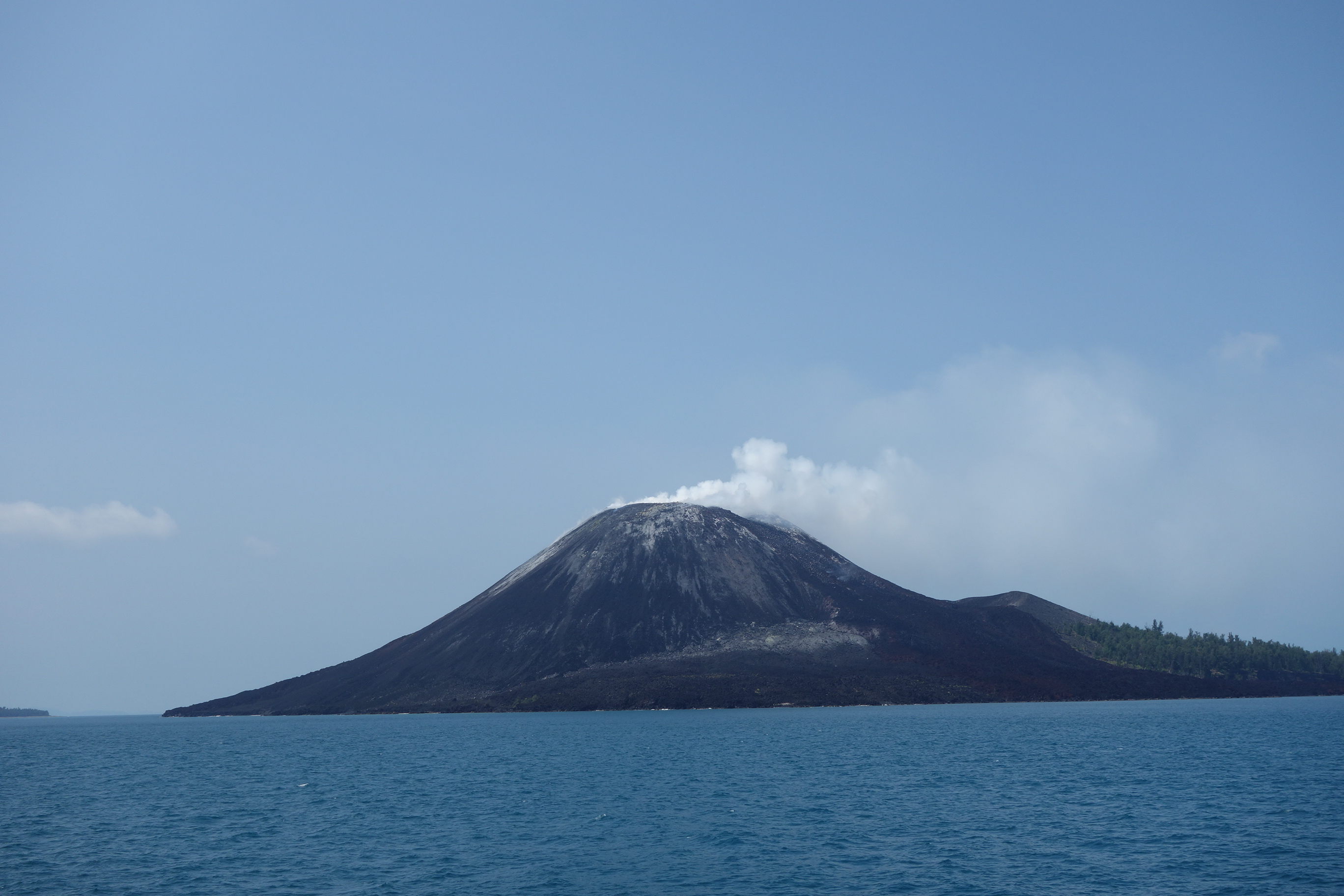 Anak Krakatau volcano in Indonesia.